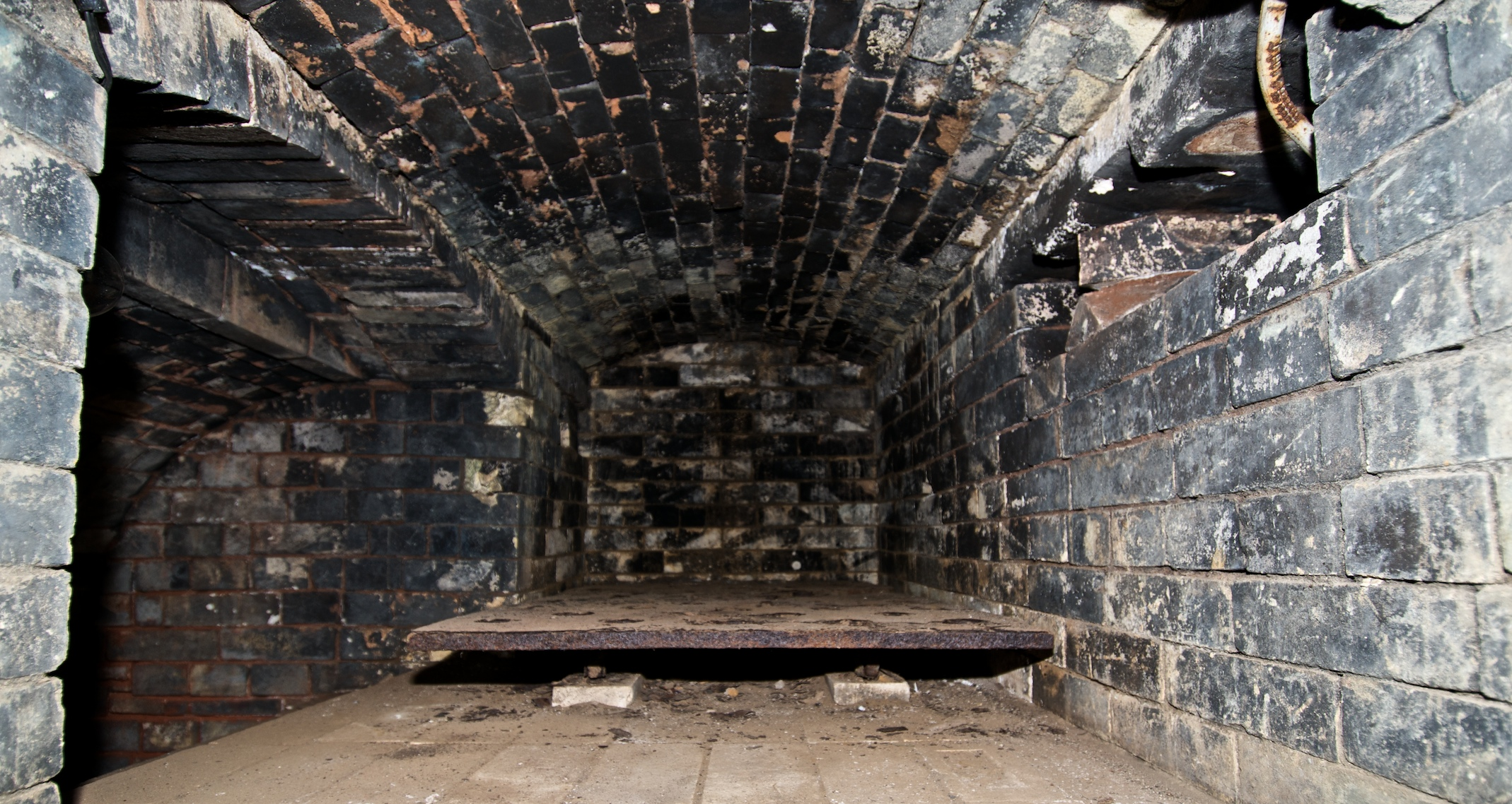 KZ-Niewelager Thil: De Krematiounsuewe vu bannen Source: Foto vum :lb:Benotzer:Cornischong mat spezieller Erlabnes vun der Gemeng Thil